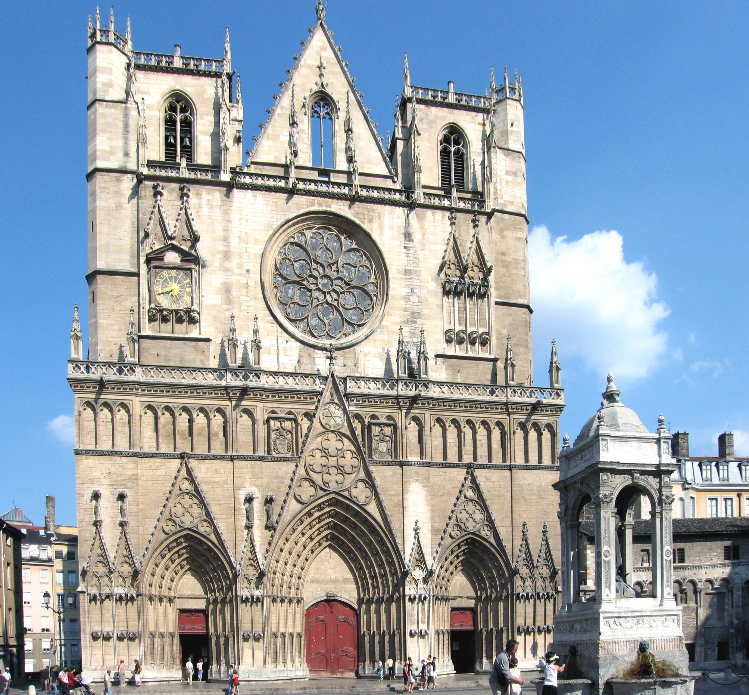 Cathédrale Saint Jean dans le vieux Lyon, France